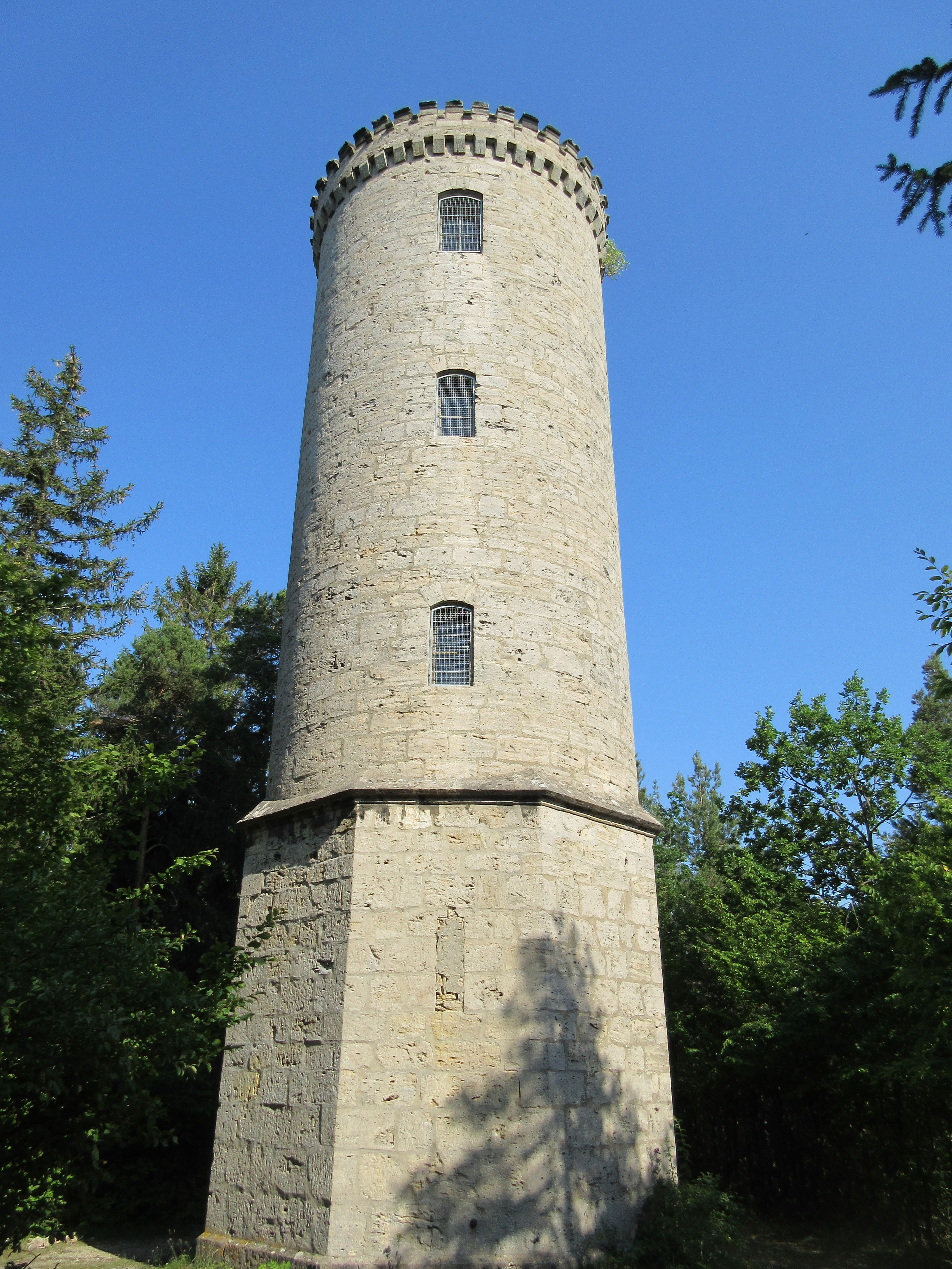 Baropturm (Rückansicht)